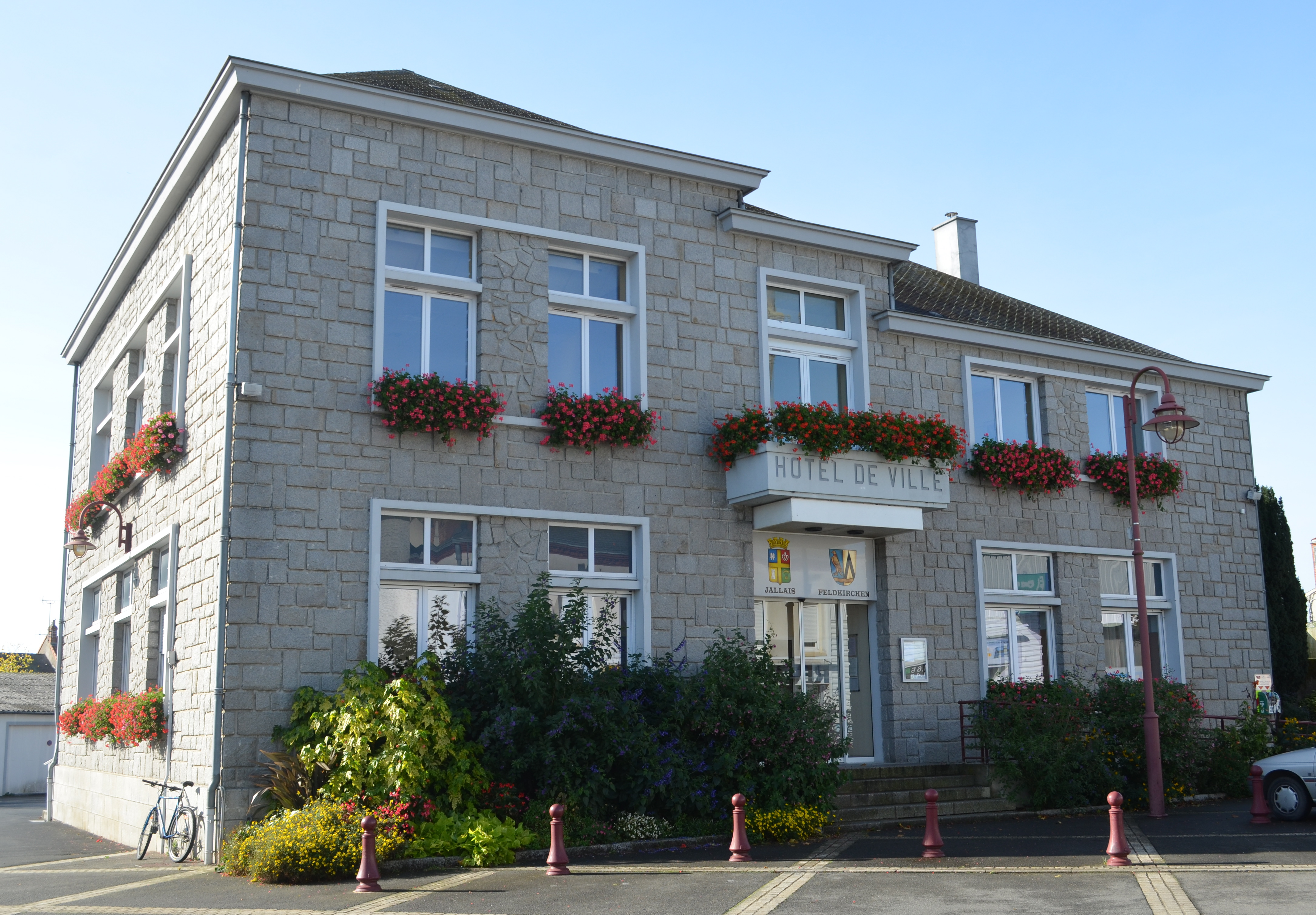 Hôtel de Ville de Jallais (Maine-et-Loire, France).